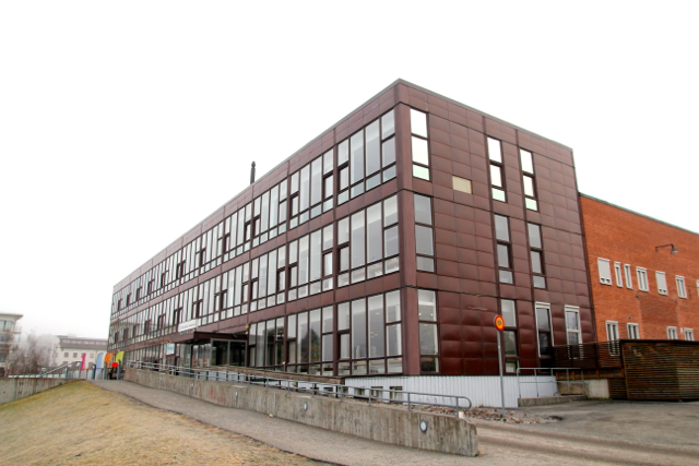 Vårdcentralen i Gustavsberg, tidigare Tekniskt Center på Gustavsbergs porslinsfabrik, kallat Glashuset